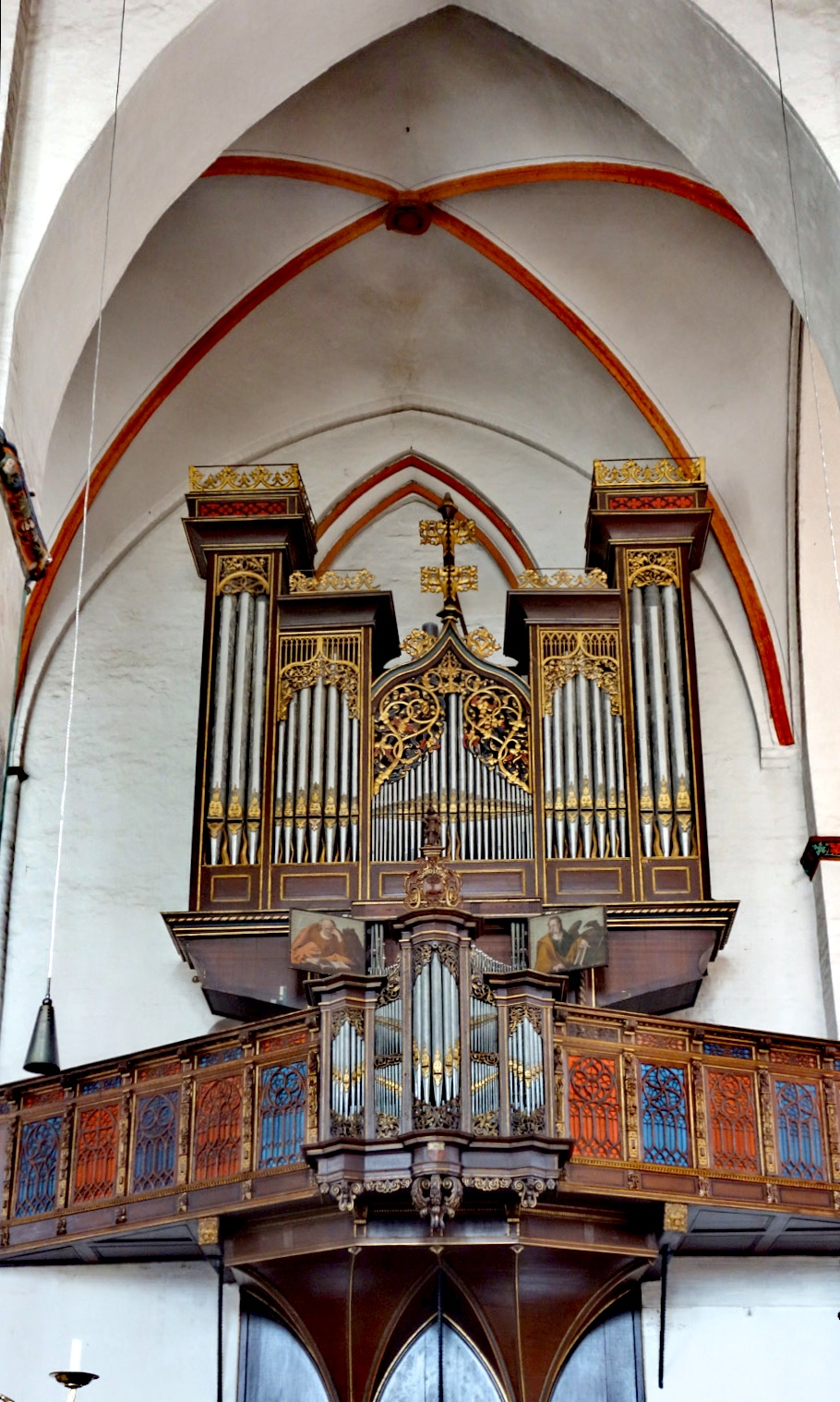 Stellwagen-Orgel in Lübeck, Jakobikirche, Schleswig-Holstein